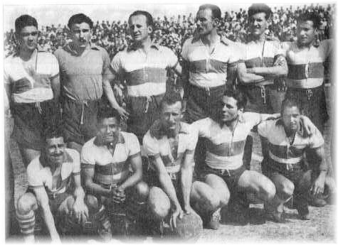 Foto del plantel de Gimnasia y Esgrima La Plata que obtuvo el campeonato de segunda división en el año 1952.